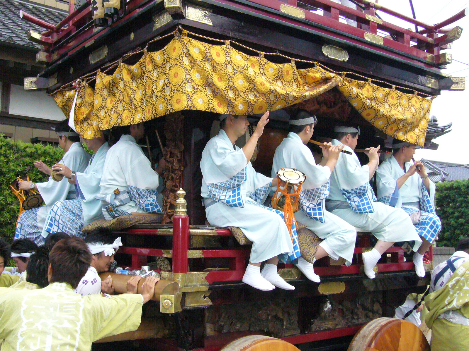 sawara-bayashi,araku-hayashiren,katori-city,japan